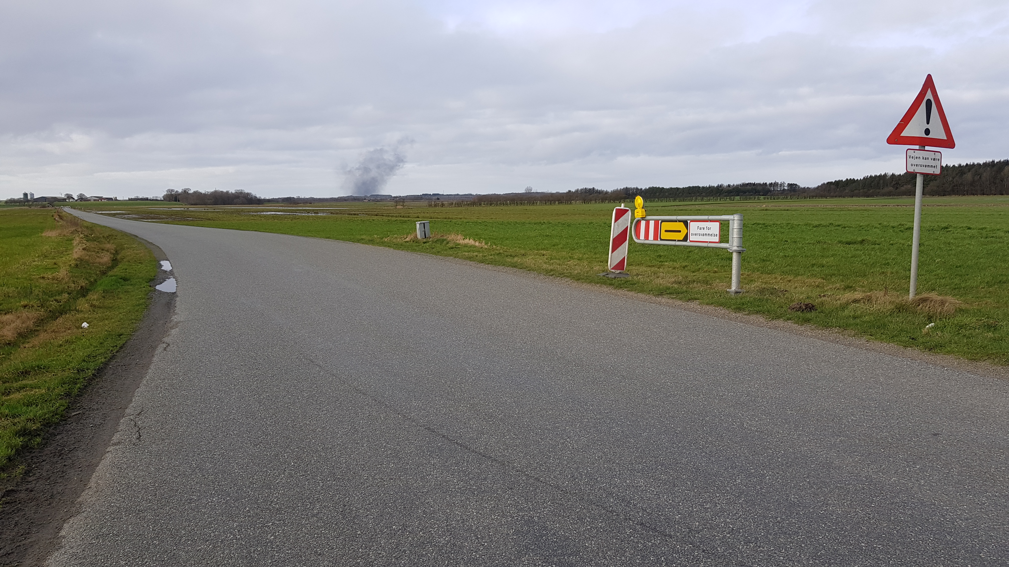 På engene, hvor Sneumvej vest for Bramming krydser Sneum Å, står der indimellem så meget vand at vejen må lukkes.